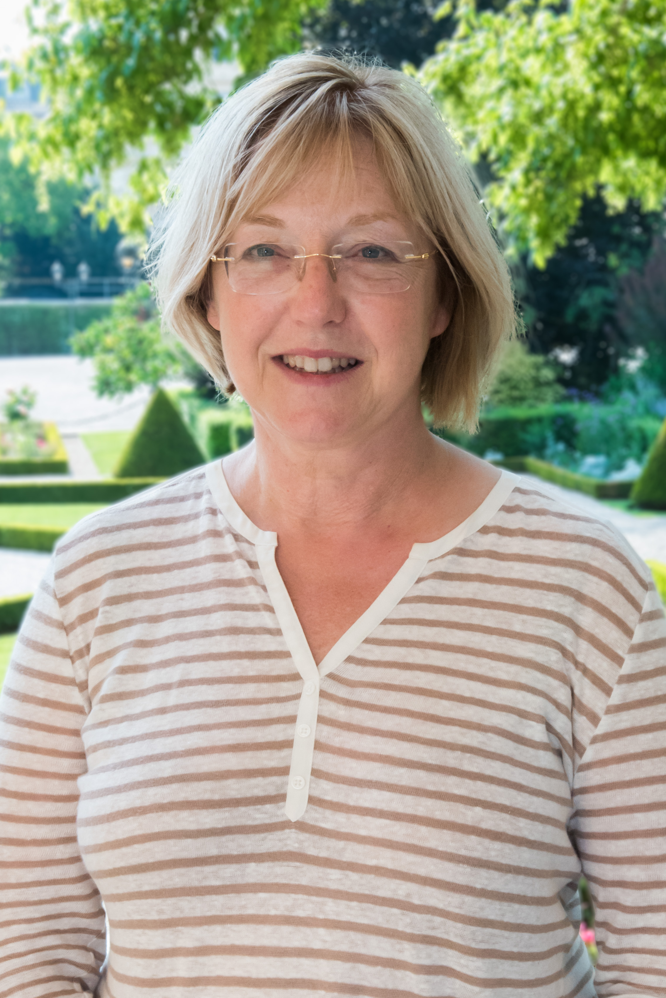 Catherine Kamowski dans le jardin des Quatre colonnes du palais Bourbon.